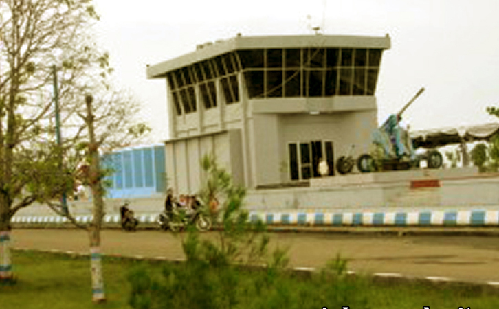 Monumen Bahari Kota Tegal